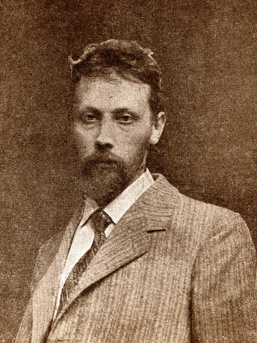 Antoni Wiwulski (1877–1919)